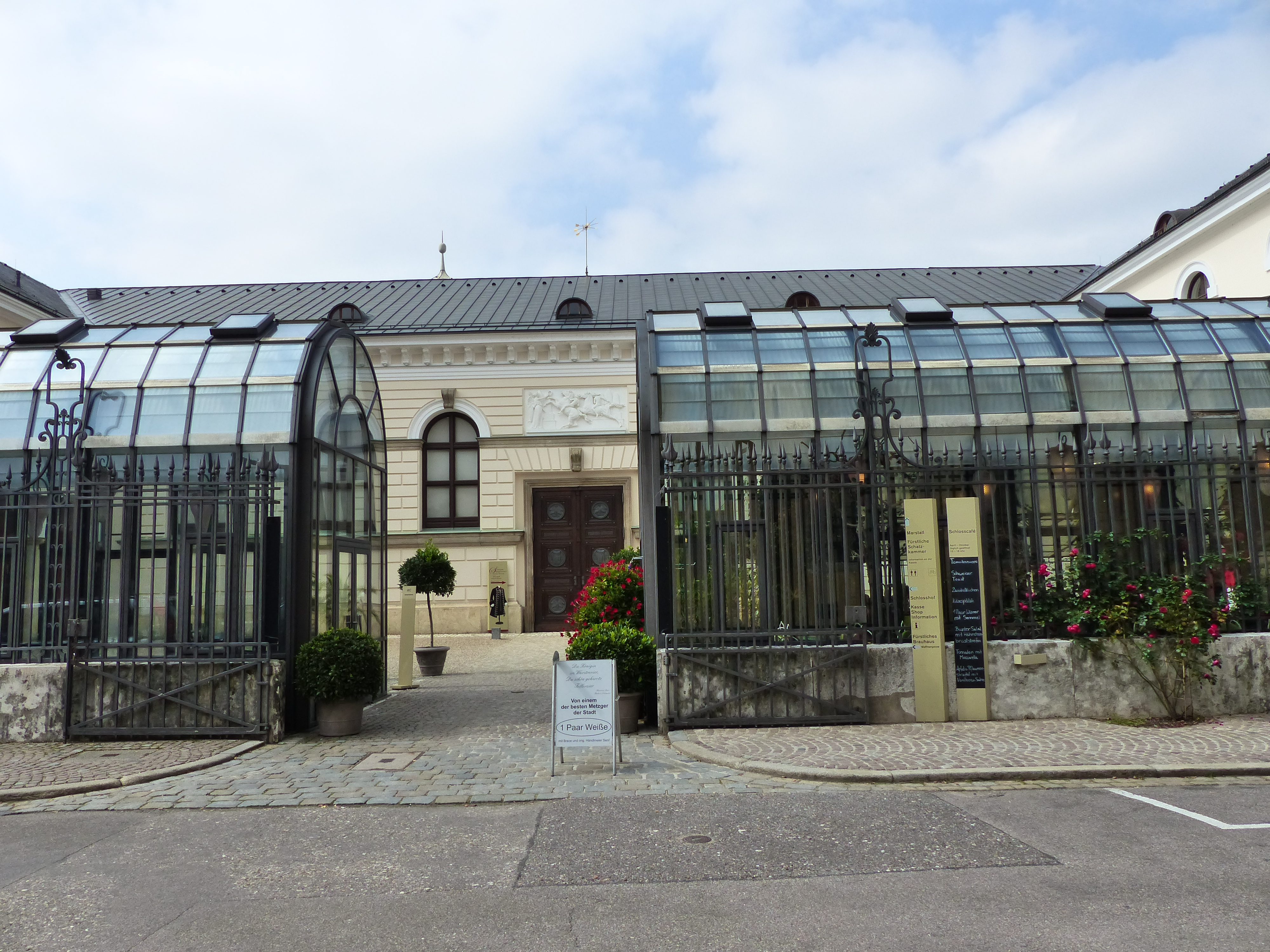 Marstall (im Hintergrund), Gastronomie (im Vordergrund) von Schloss St. Emmeram in RegensburgThis is a photograph of an architectural monument.